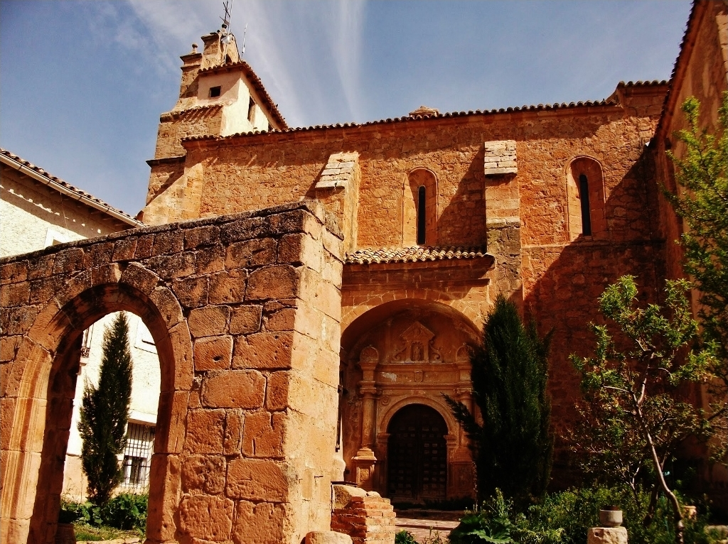 Iglesia Nuestra Señora de la Leche, en Alconchel de Ariza, Zaragoza, España.